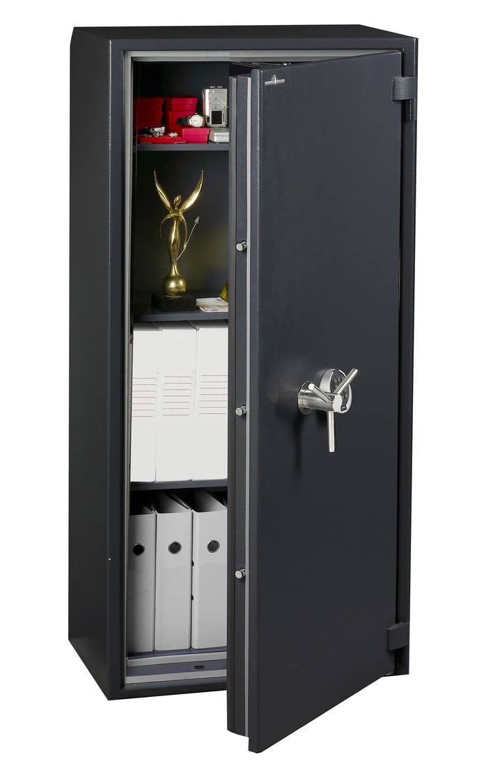 Coffre fort avec une serrure à combinaison électronique et poignée étoile.